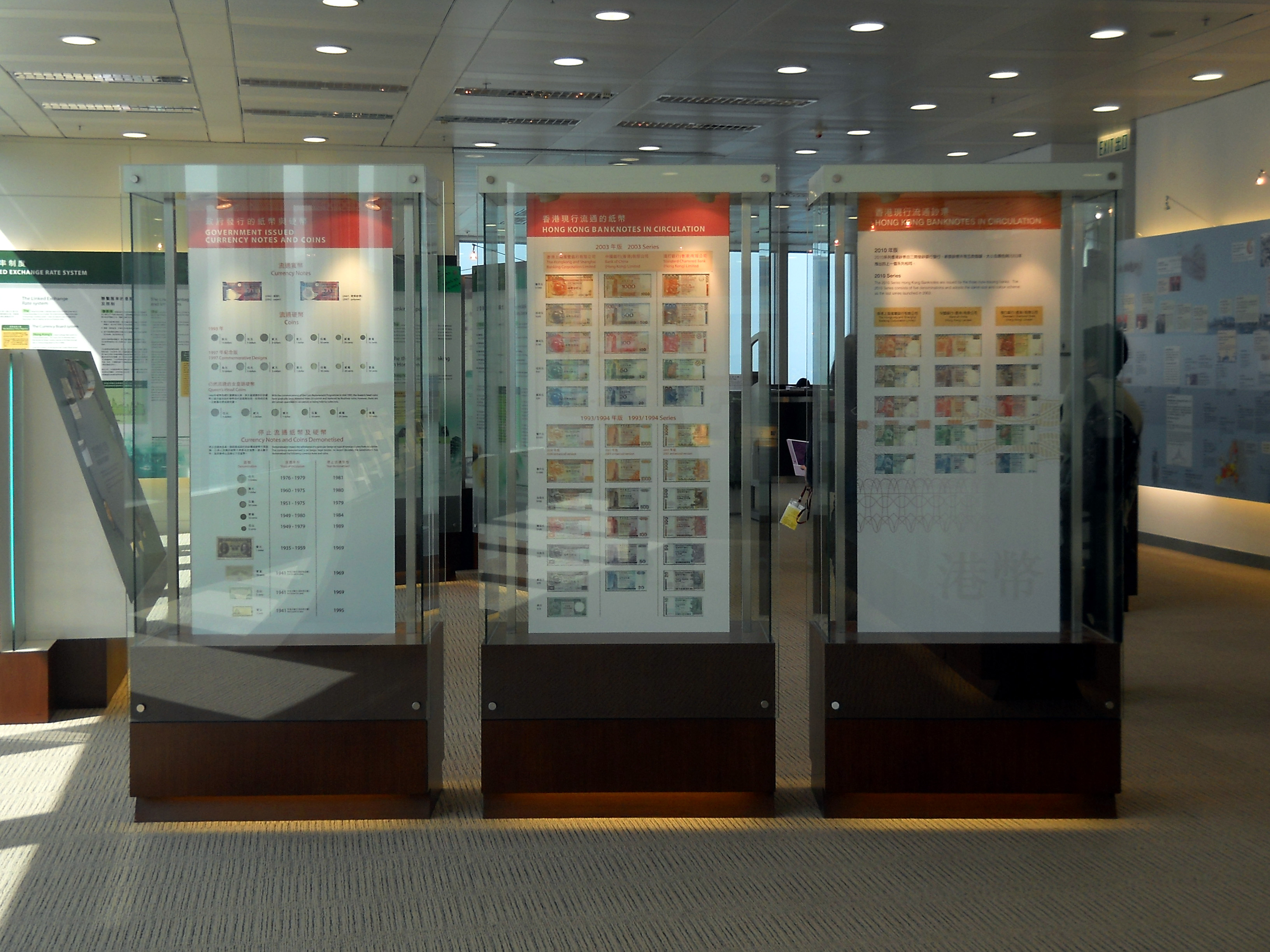 中文（香港）: 金管局資訊中心-香港發行的紙幣及硬幣